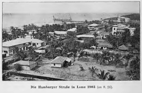 Die Hamburger Straße in Lome (Togo) aus dem Jahr 1903.